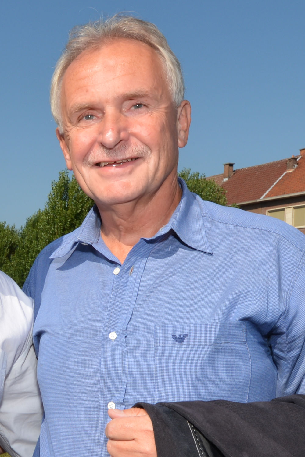 Burgemeester Wilhelm Wiggenhagen tijdens het planten van een vriendschapsboom in Vilvoorde die de steden Vilvoorde (België) en Ennepetal (Duitsland) met elkaar symbolisch verbindt.